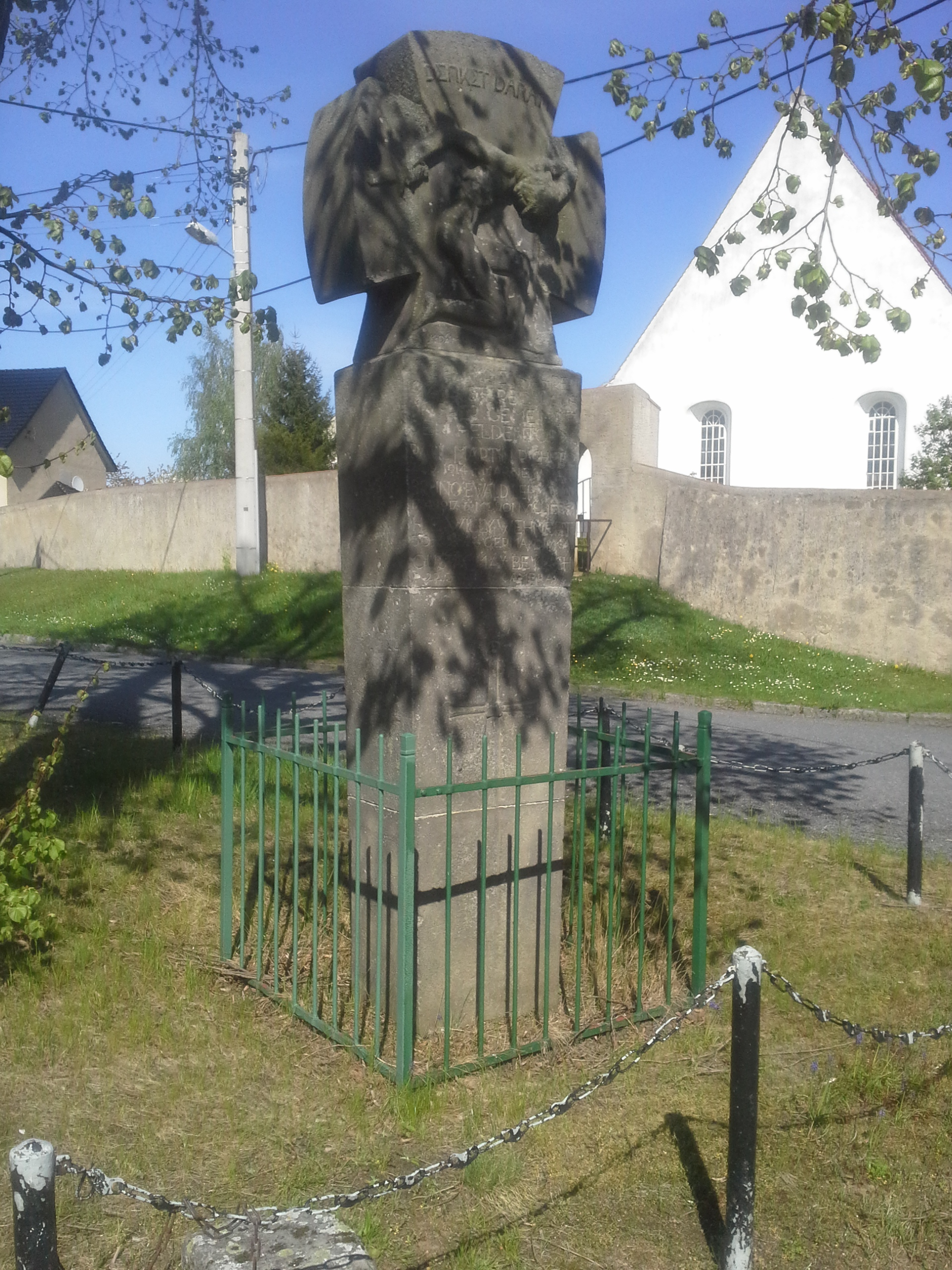 Gefallenendenkmal in Blochwitz(Lampertswalde)